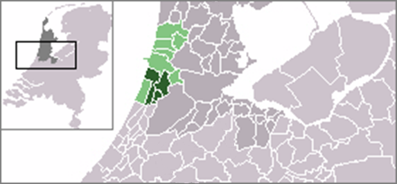 Kaartje van Grootstedelijke Agglomeratie Haarlem en Stedelijk Gebied Haarlem